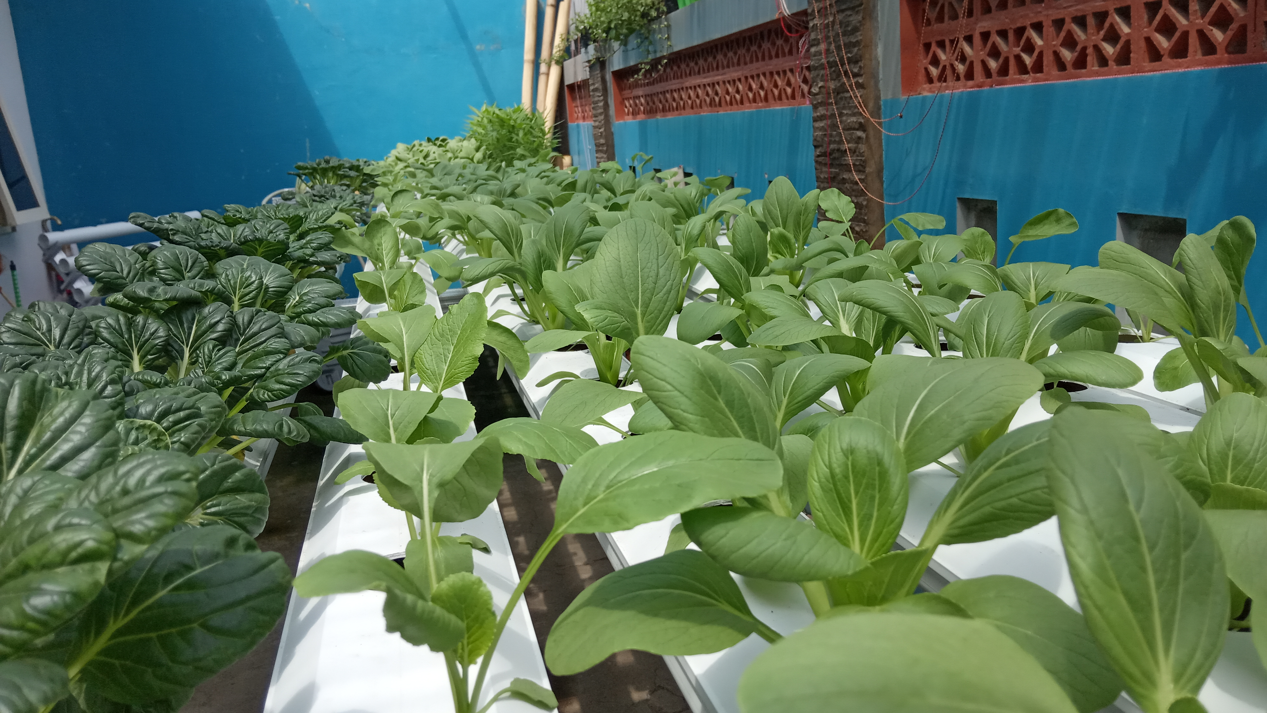 Budidaya Tanaman Sayur Secara Hidroponik di Kebun SAP Garden Hidroponik, Indonesia